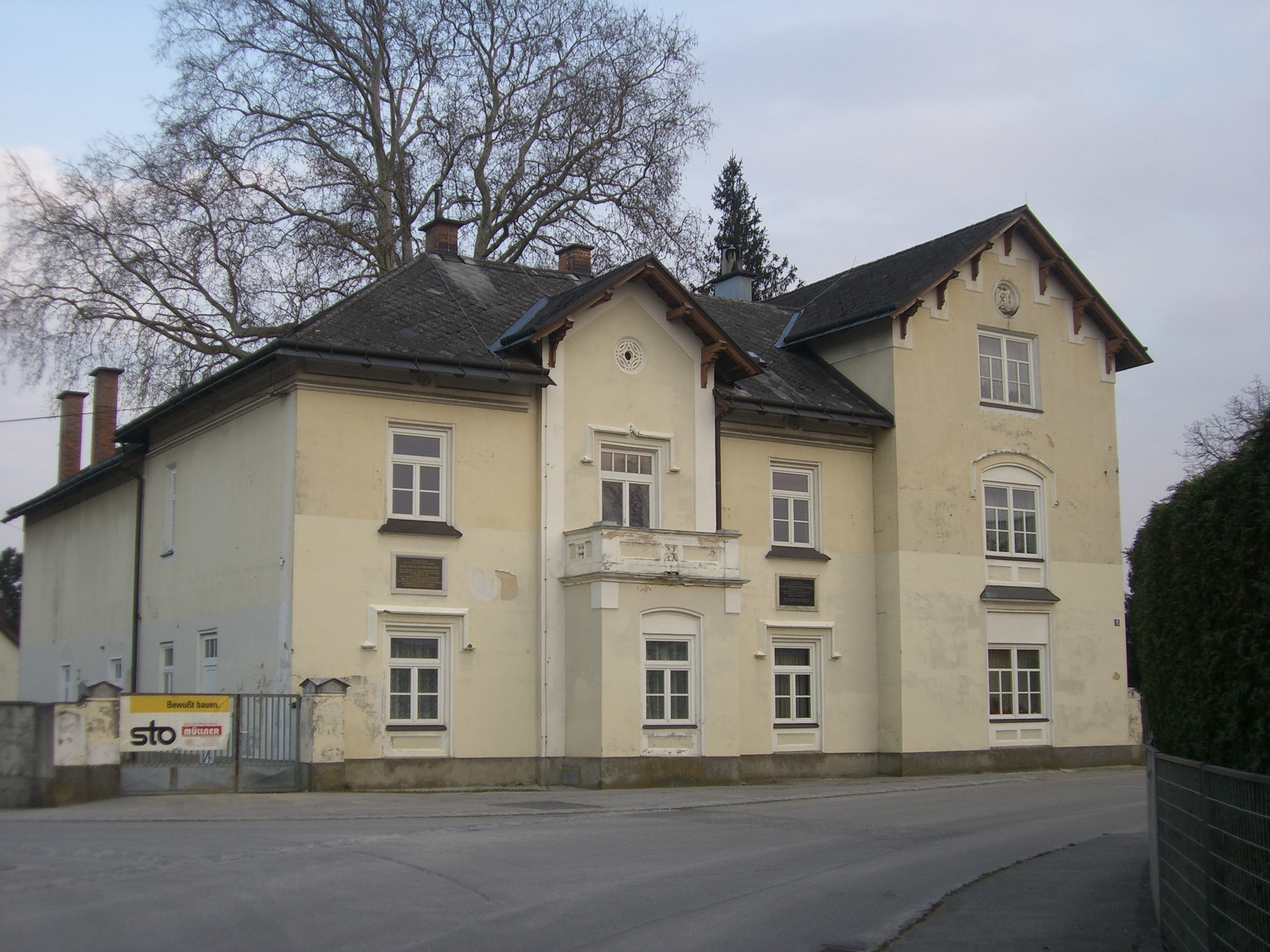 Ledochowska-Haus, Albrechtsberger Straße 6, Loosdorf